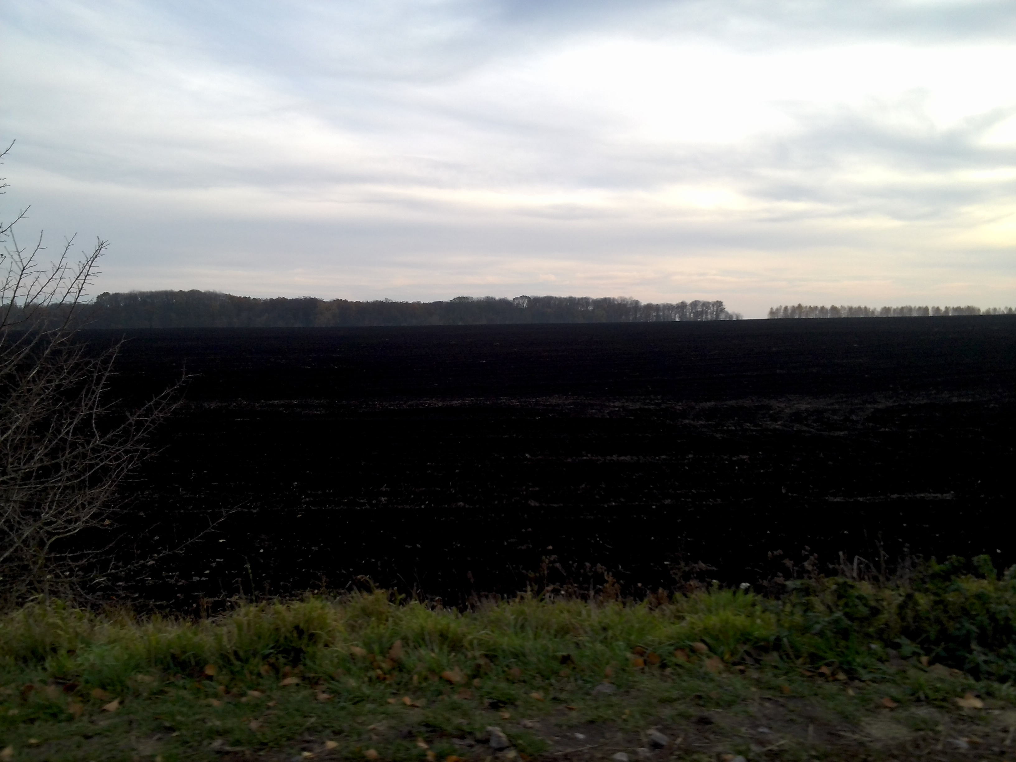 с. Вербівка. Чорноземи на околицях